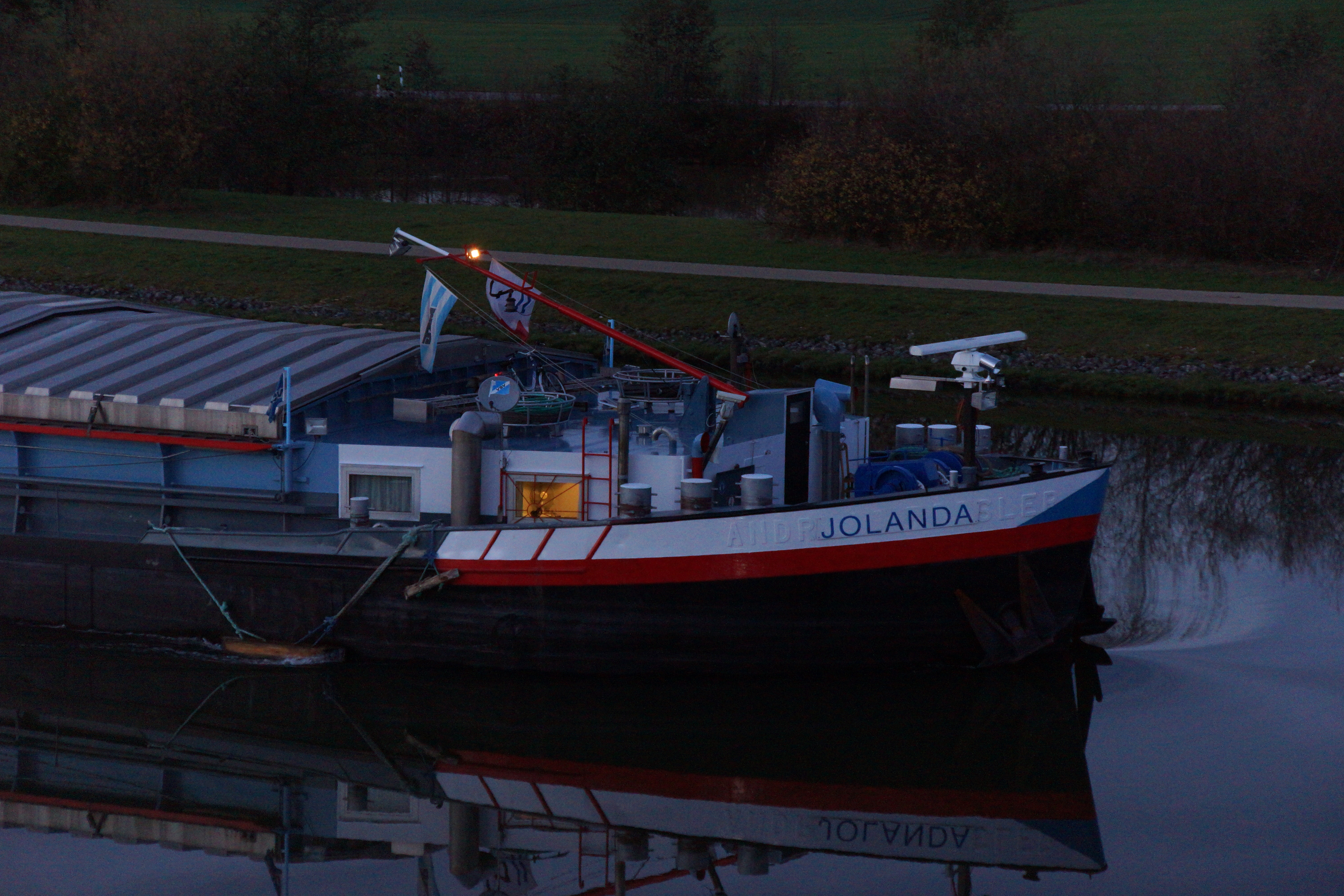 Der Main-Donaukanal bei Freystadt in der Oberpfalz: Das Binnenmotorschiff Jolanda